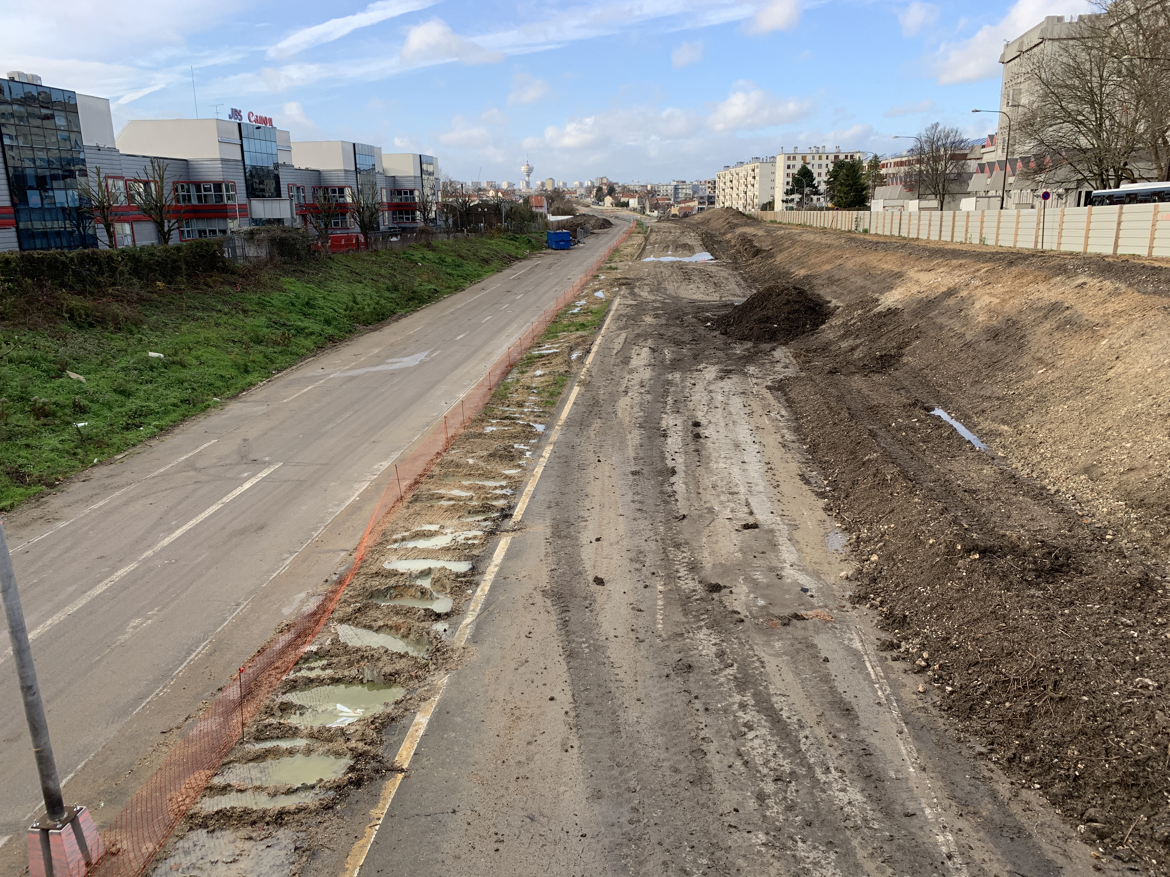 Chantier de préparation de ligne 1 du tramway d'Île-de-France sur l'ancienne autoroute A186 à Montreuil, Seine-Saint-Denis.